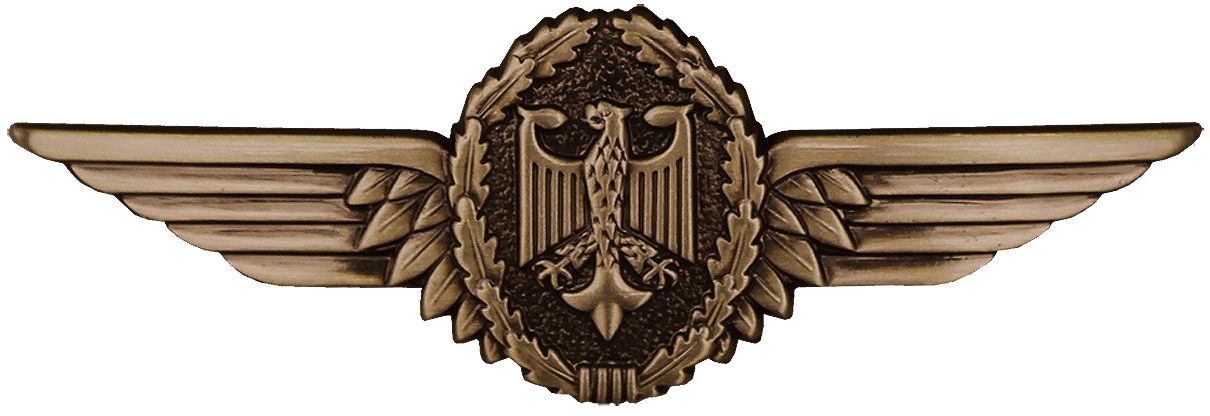 Tätigkeitsabzeichen für Militärluftfahrzeugführer der Bundeswehr Voraussetzungen: Stufe I, Bronze: Besitz des Militärluftfahrzeugführerscheins (MFS) und Luftfahrzeugführergrad 3 (Standard Pilot). Stufe II, Silber: Besitz des MFS und Luftfahrzeugführergrad 2 (Senior Pilot) und 1200 Flugstunden. Stufe III, Gold: Besitz des MFS und Luftfahrzeugführergrad 1 (Command Pilot) und 1800 Flugstunden. Anmerkung: Als Flugstunden angerechnet wird die gesamte Flugzeit als 1. bzw. 2. Luftfahrzeugführer einschließlich Schulung und Auswahlschulung mit dienstlichem Auftrag. Ausführung: Bundesadler mit Eichenlaubumrandung in Doppelschwinge mit unterem Federkranz, metallgeprägt; bronze-, silber- oder goldfarben.